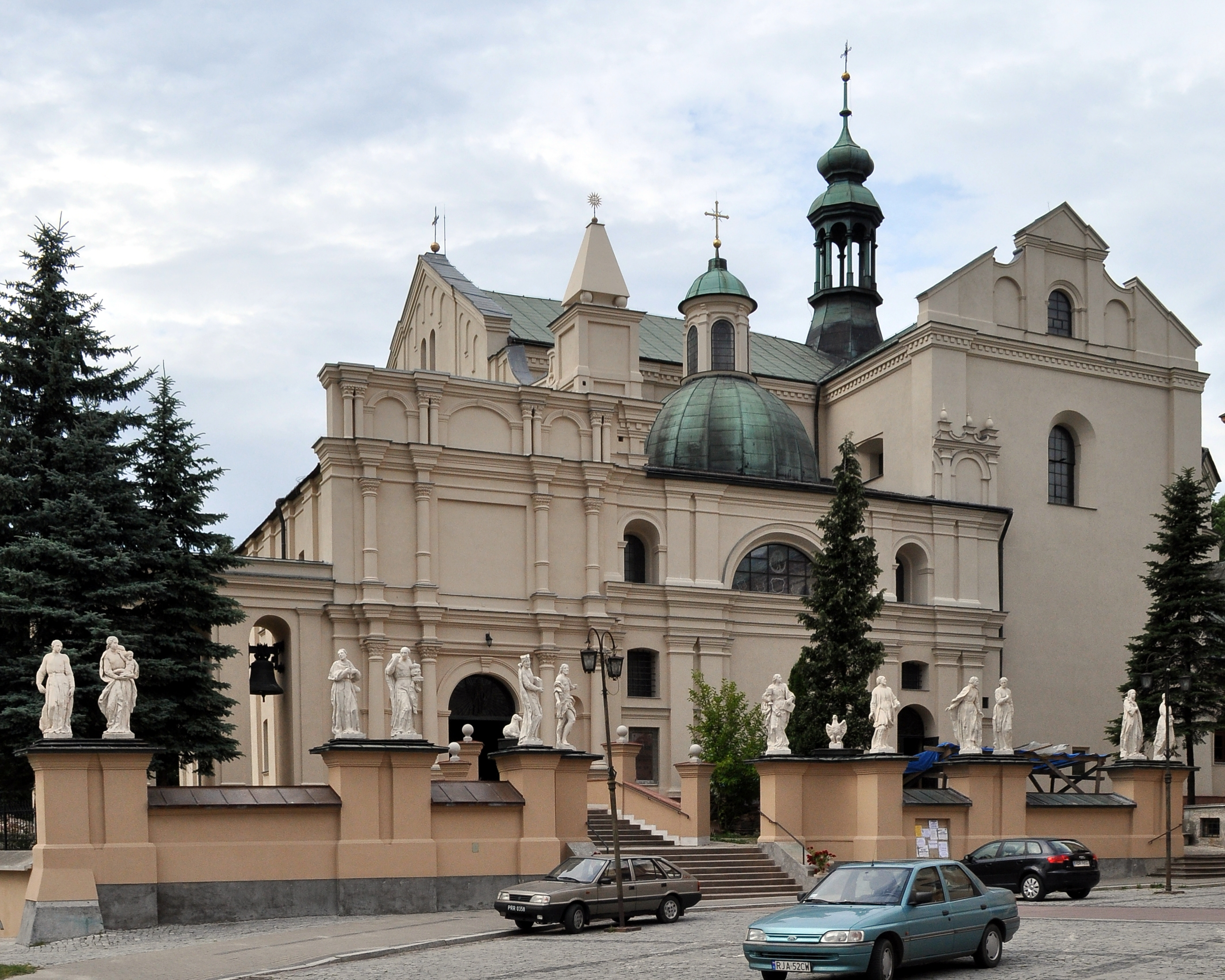 Kolegiata Bożego Ciała w Jarosławiu